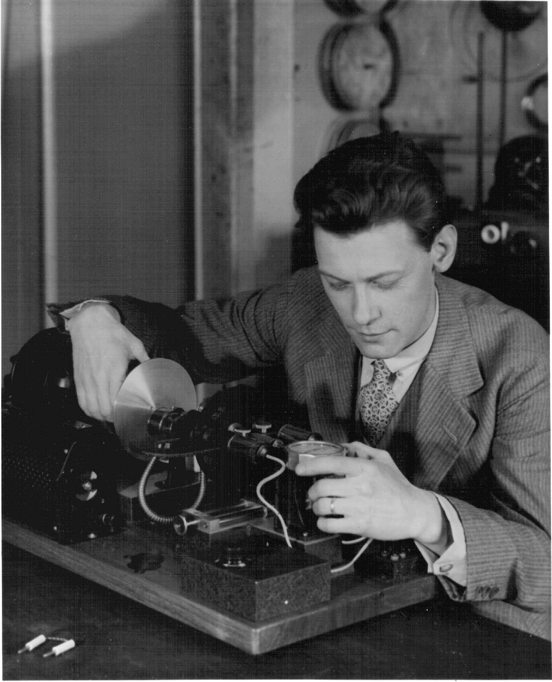 Rune Elmqvist justerar en galvanometer i Lunds Universitetsverkstad